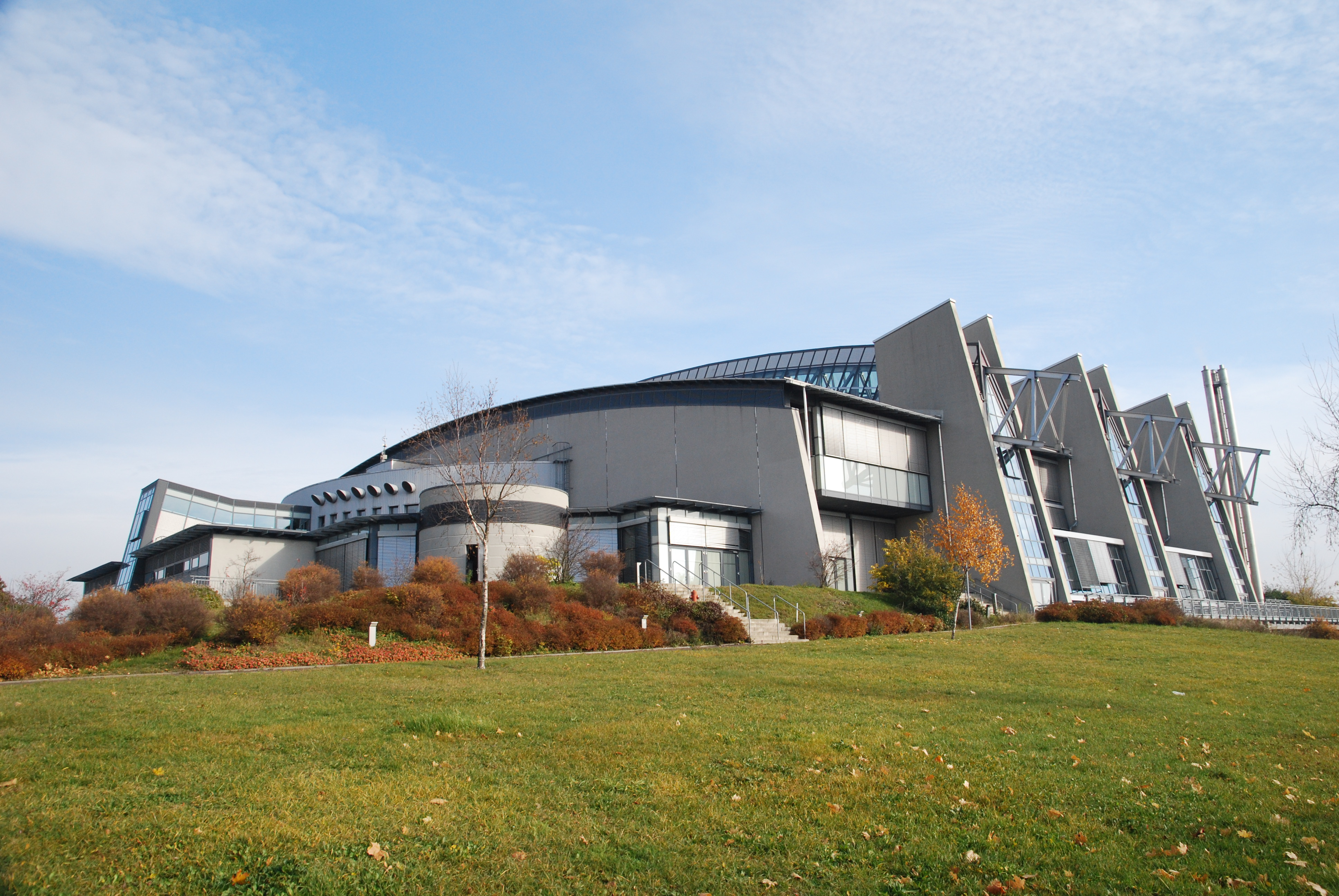 GETEC Arena Magdeburg (ehemalige Bördelandhalle)